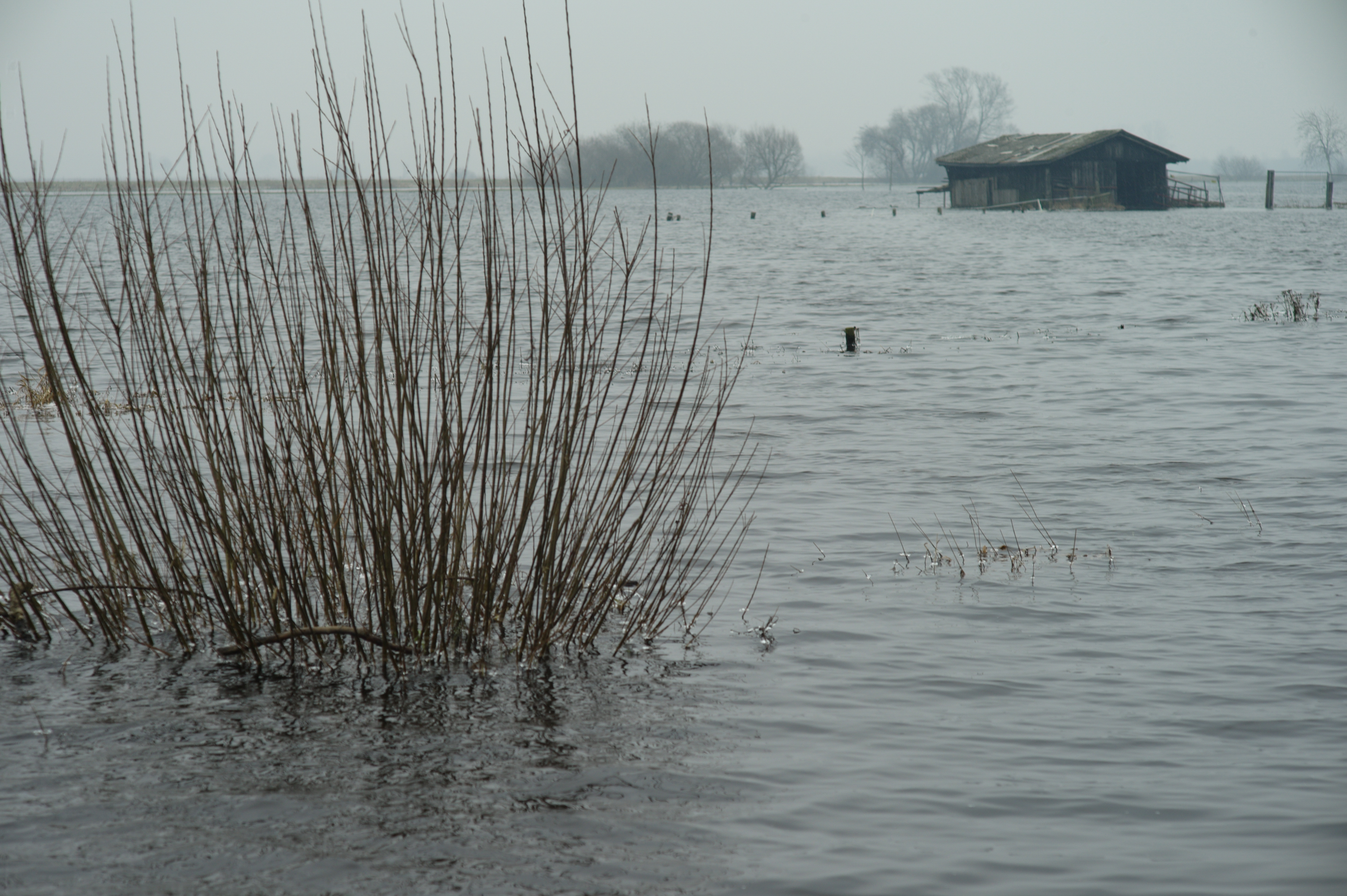 Bremen, NSG Borgfelder Wümmewiesen. Die Wümmewiesen bei Borgfeld sind im Winter häufig überschwemmt und damit ein wichtiges Retentionsgebiet für den Fluss.